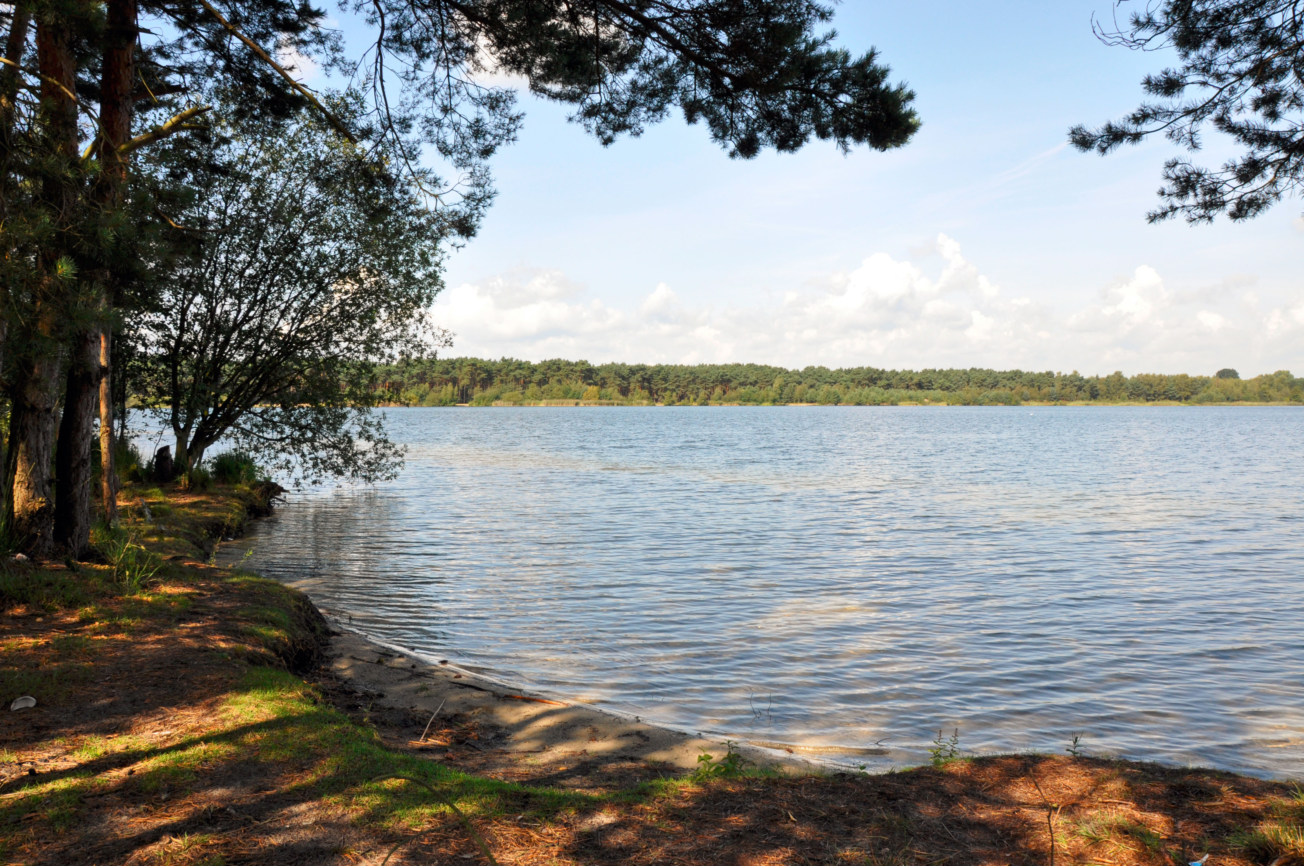 Kempense Meren - berges du lac Rauwse Meer